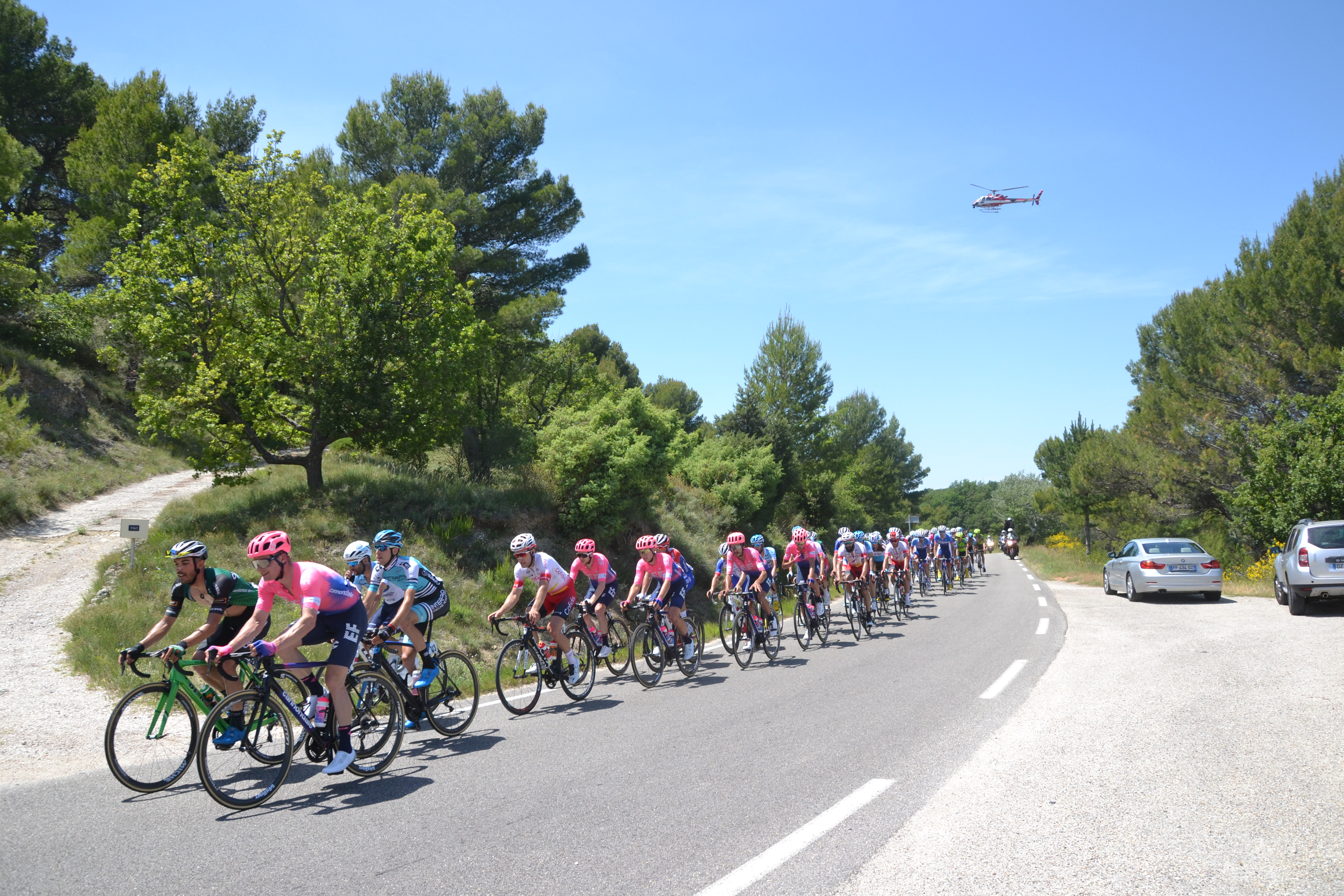 Peloton du Mont Ventoux Dénivelé Challenges 2019, dans la montée vers Blauvac